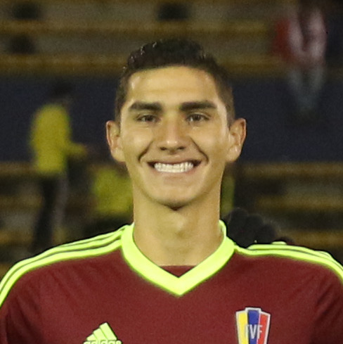 Quito, 2 feb (Andes).- La selección juvenil de Venezuela goleó 4-2 este jueves a su par de Ecuador, que comprometió seriamente sus opciones de clasificar al Campeonato Mundial Sub 20 Corea del Sur 2017, que se desarrollará en mayo próximo. ANDES/Micaela Ayala V.